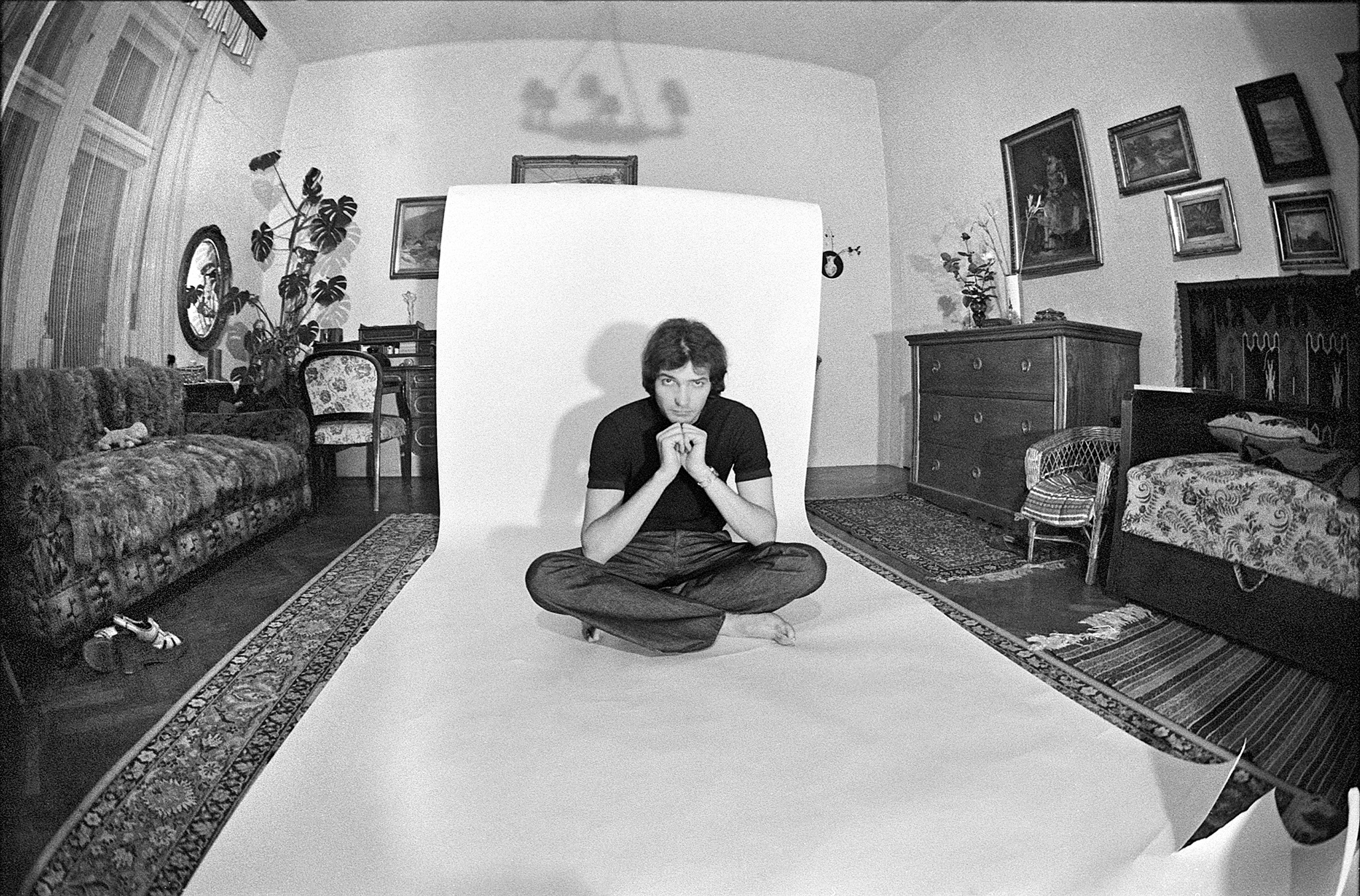 Martin Gábor fotós önarcképe